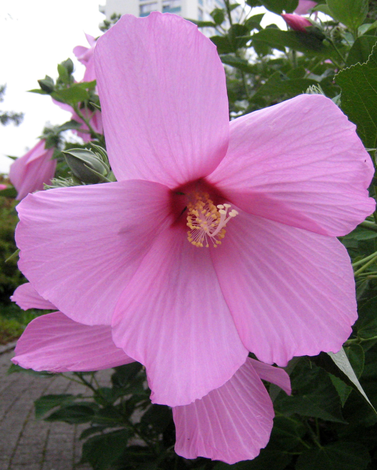 Hibiscus palustris, Swamp Rose-Mallow. Besançon, jardin botanique, France.